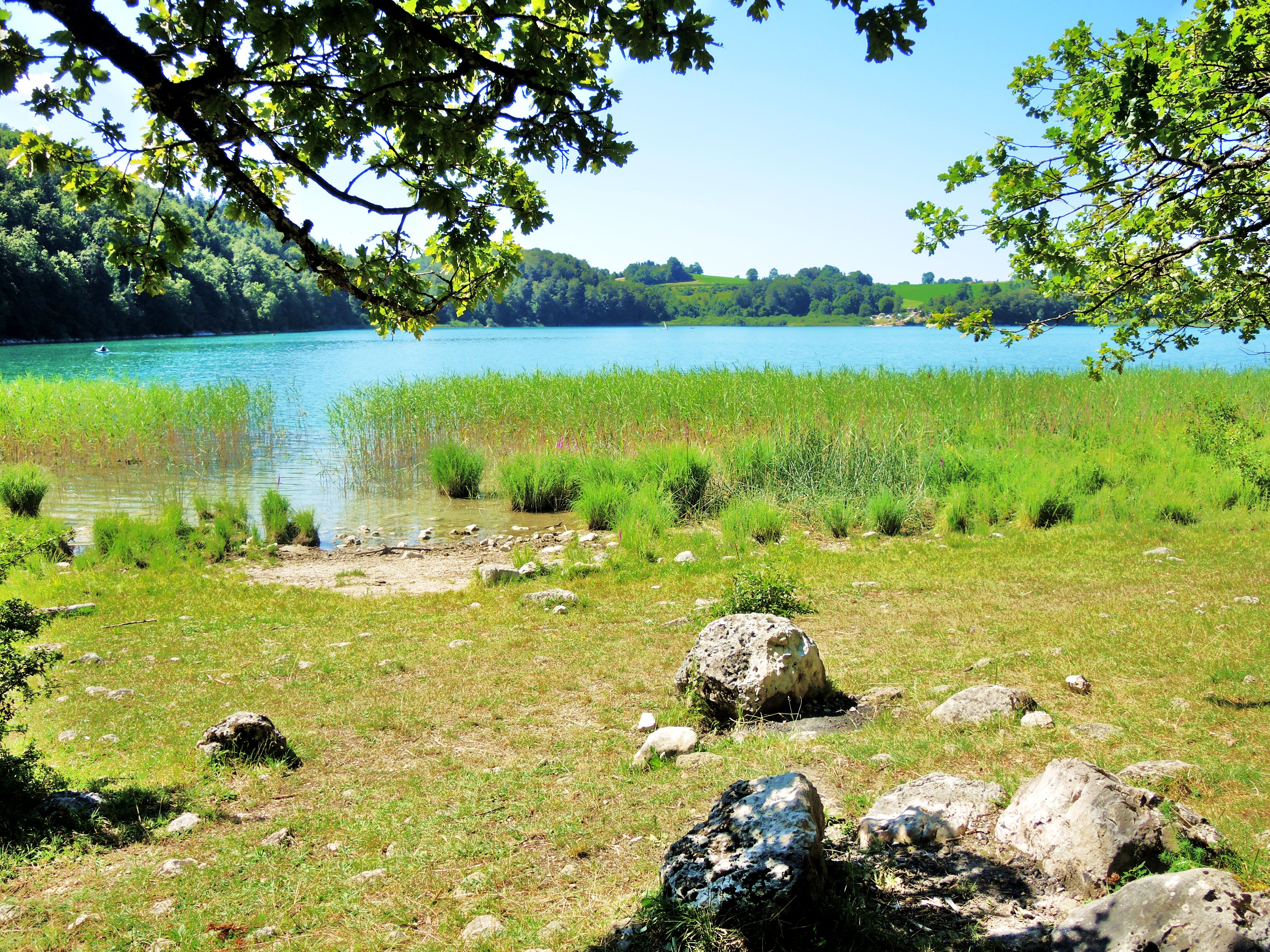 Autre vue de la rive nord du lac de Narlay